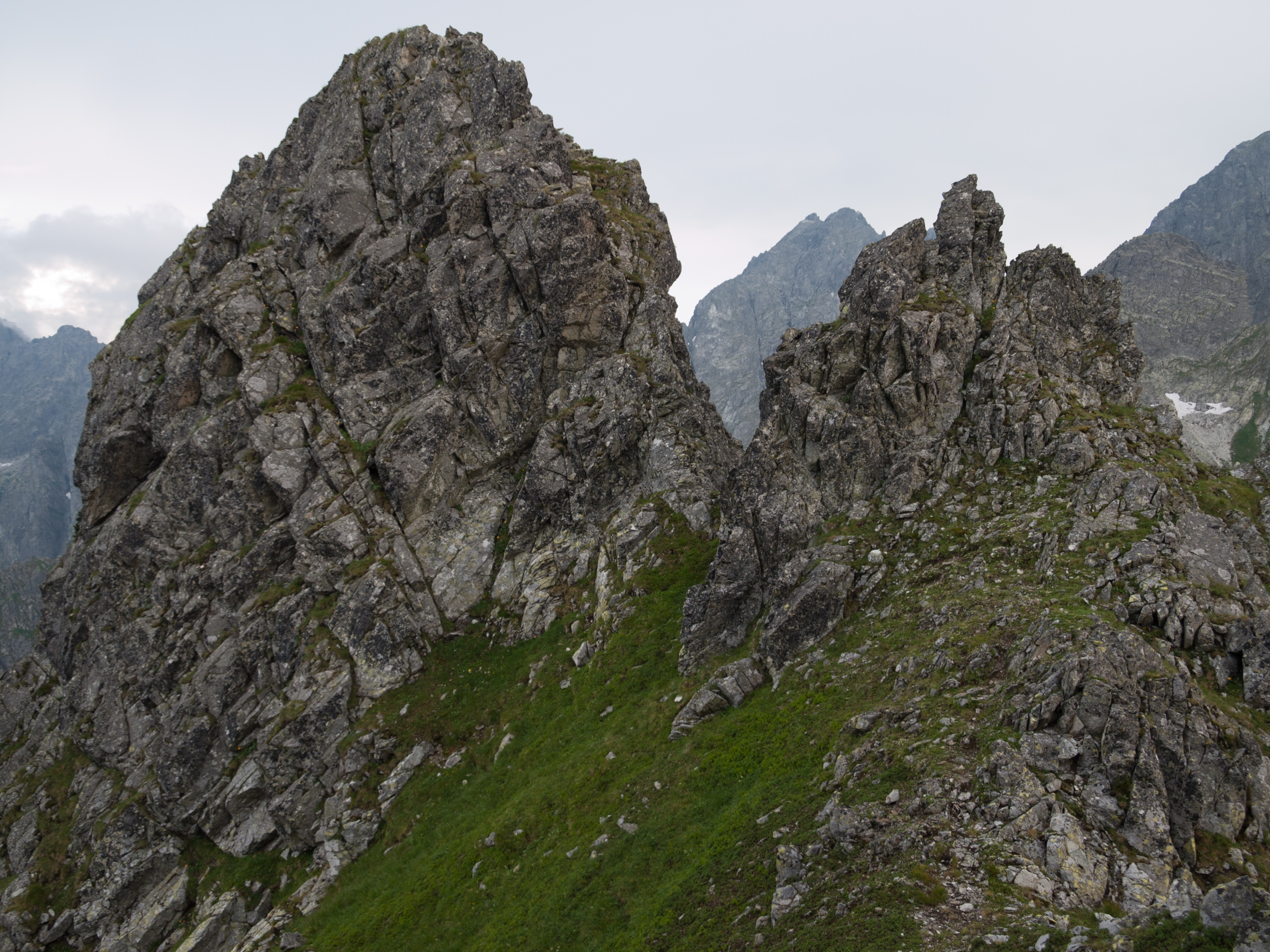 Niżnia Widłowa Turnia (po lewej) i Widłowy Zwornik (po prawej).